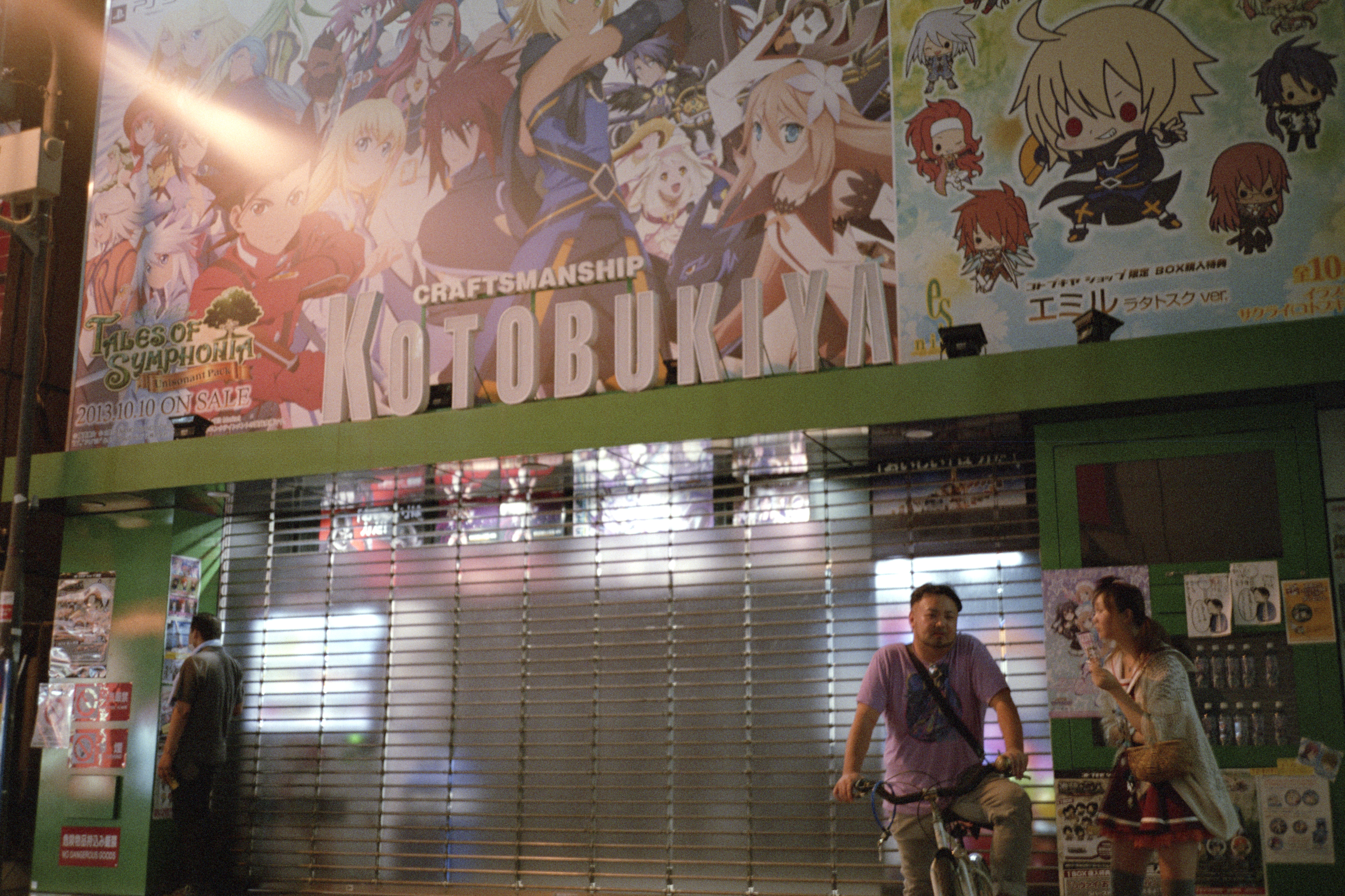 日本東京都千代田区外神田一丁目、コトブキヤ秋葉原館入り口。